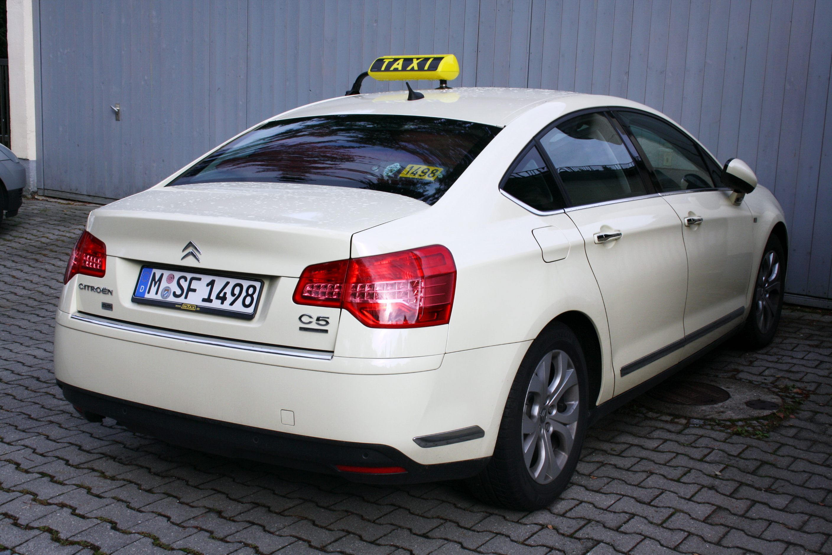 C5 Mk2 - Citroen als Taxi.